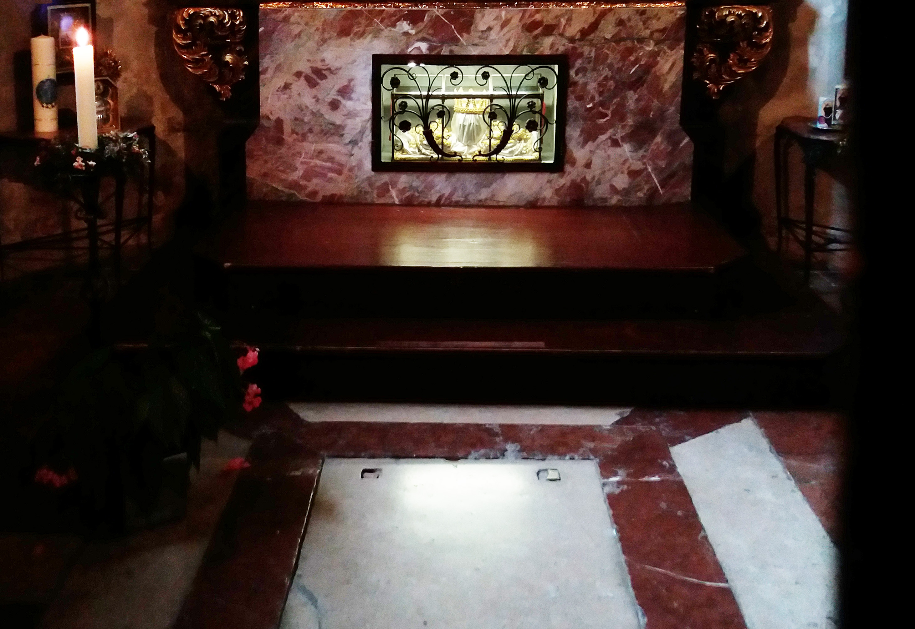 Haupt der Irmgard von Chiemsee in der Kapelle der Sel. Irmgard, Reliquie